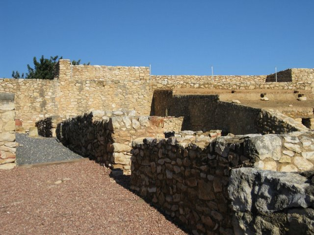 Vista de la ciudadela iberica de Calafell